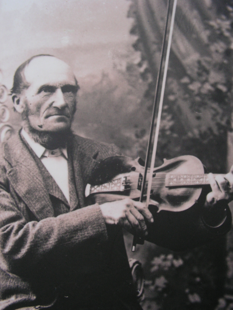 A hardanger player.